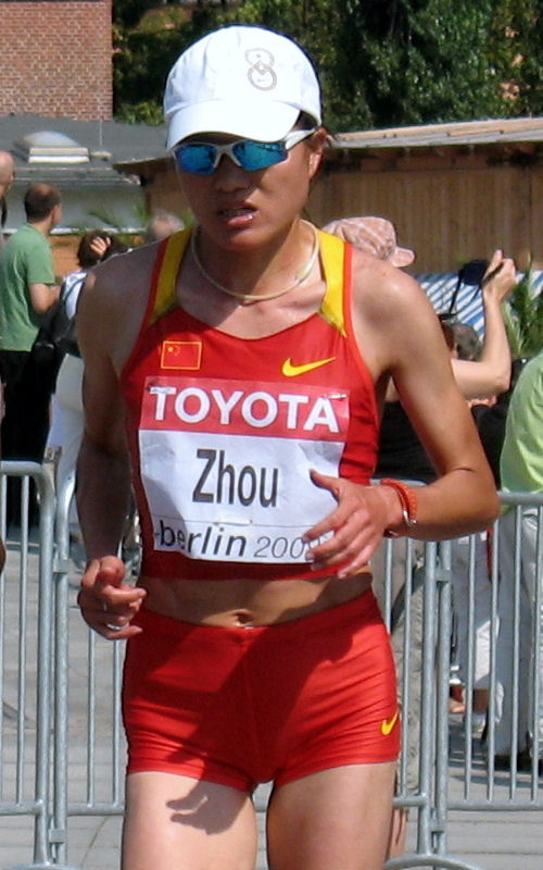 Zhou Chunxiu in Berlin, 23.08.2009